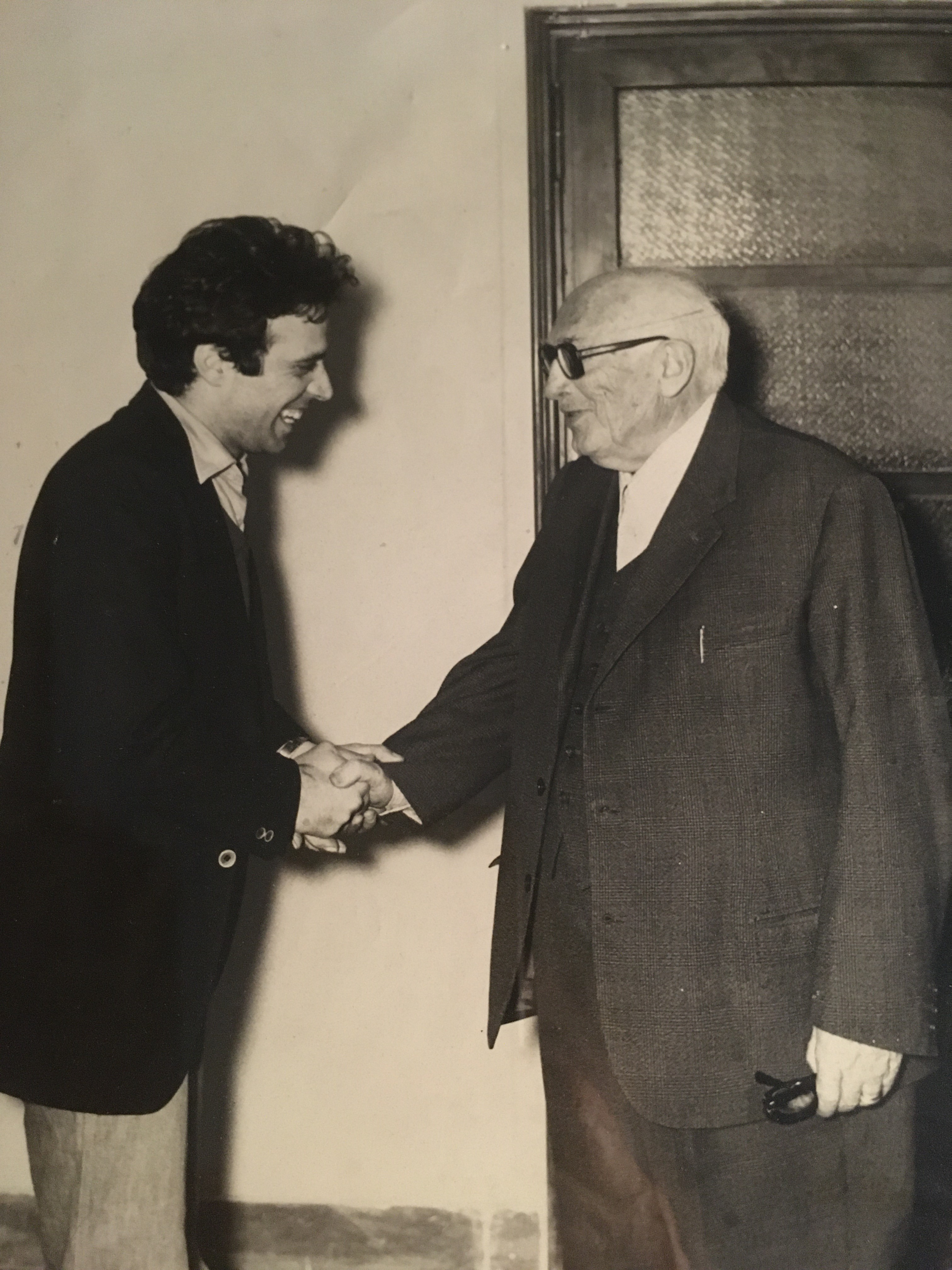 Enrico Montesano e Pietro Nenni leader storico del Partito Socialista Italiano